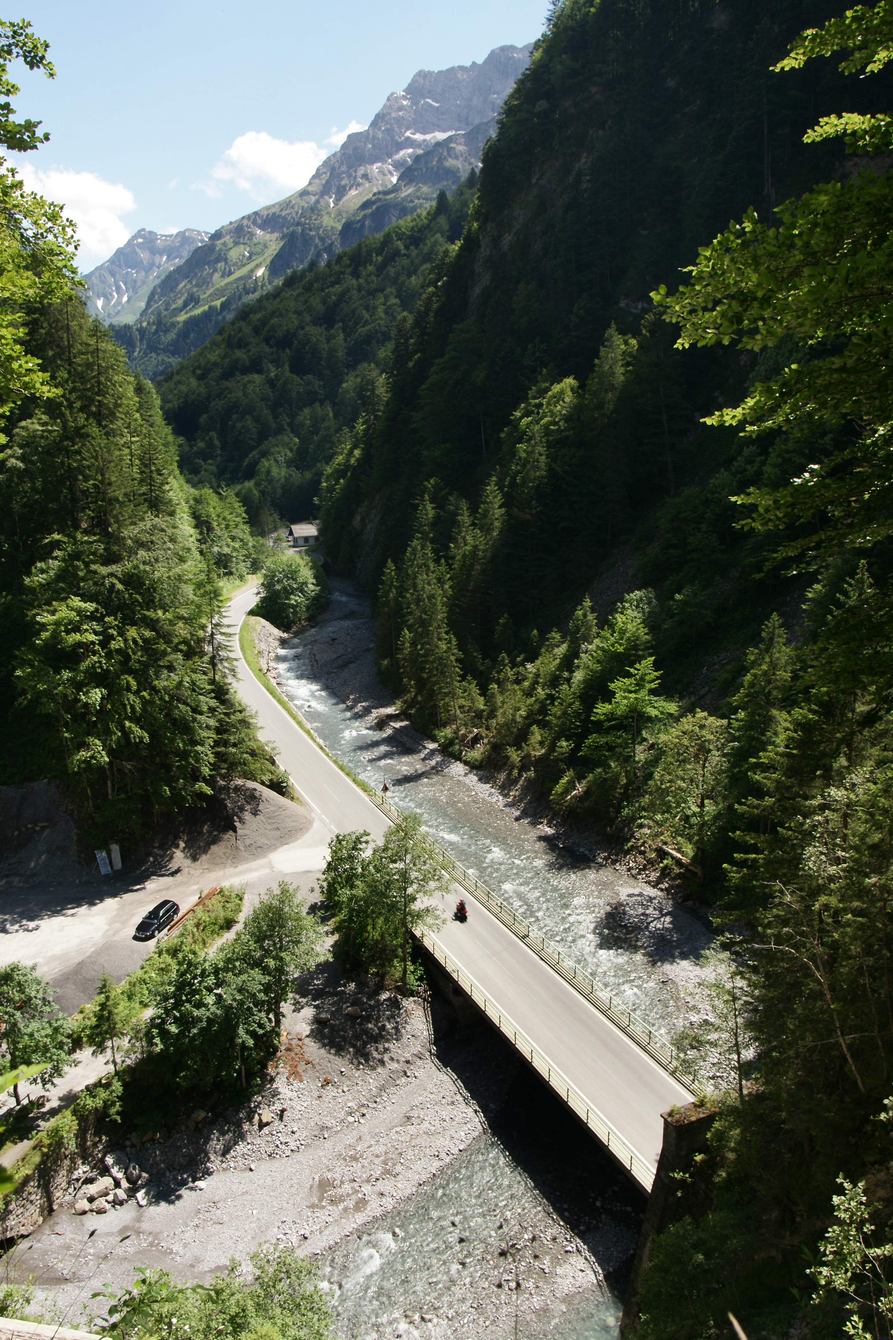 Blick von der Armenseelenkapelle, in Boden bei Schoppernau auf die Bregenzerwaldstraße L200 und die Bregenzer Ache.